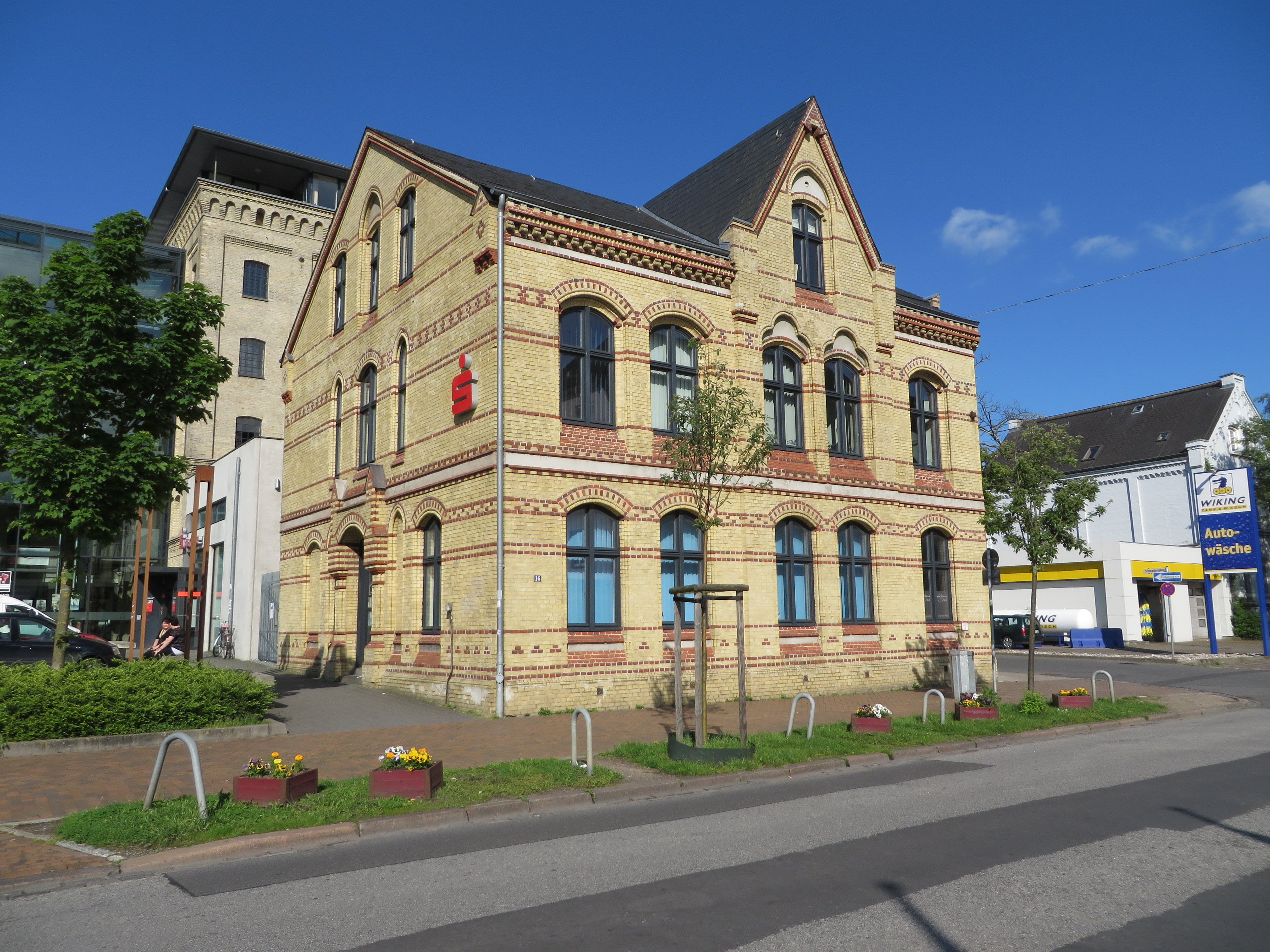 Gebäude vom Komplex der Flensburger Walzenmühle, Neustadt 16